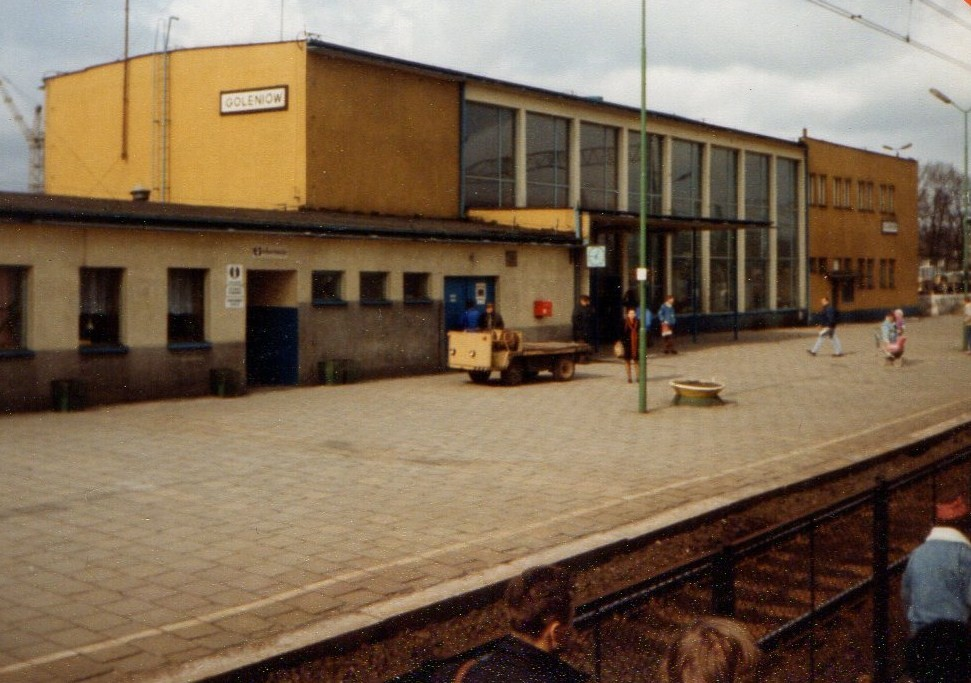 Dworzec kolejowy w Goleniowie.